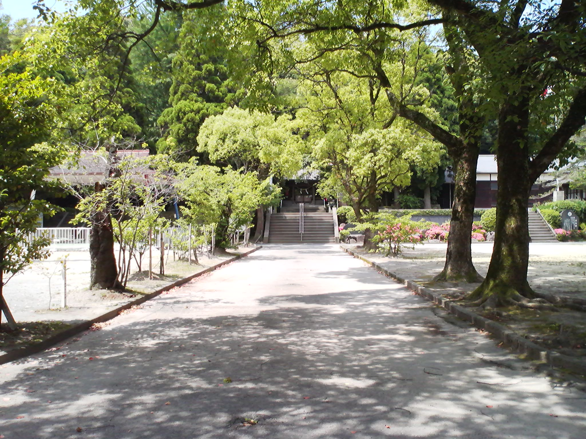 徳重神社の外観